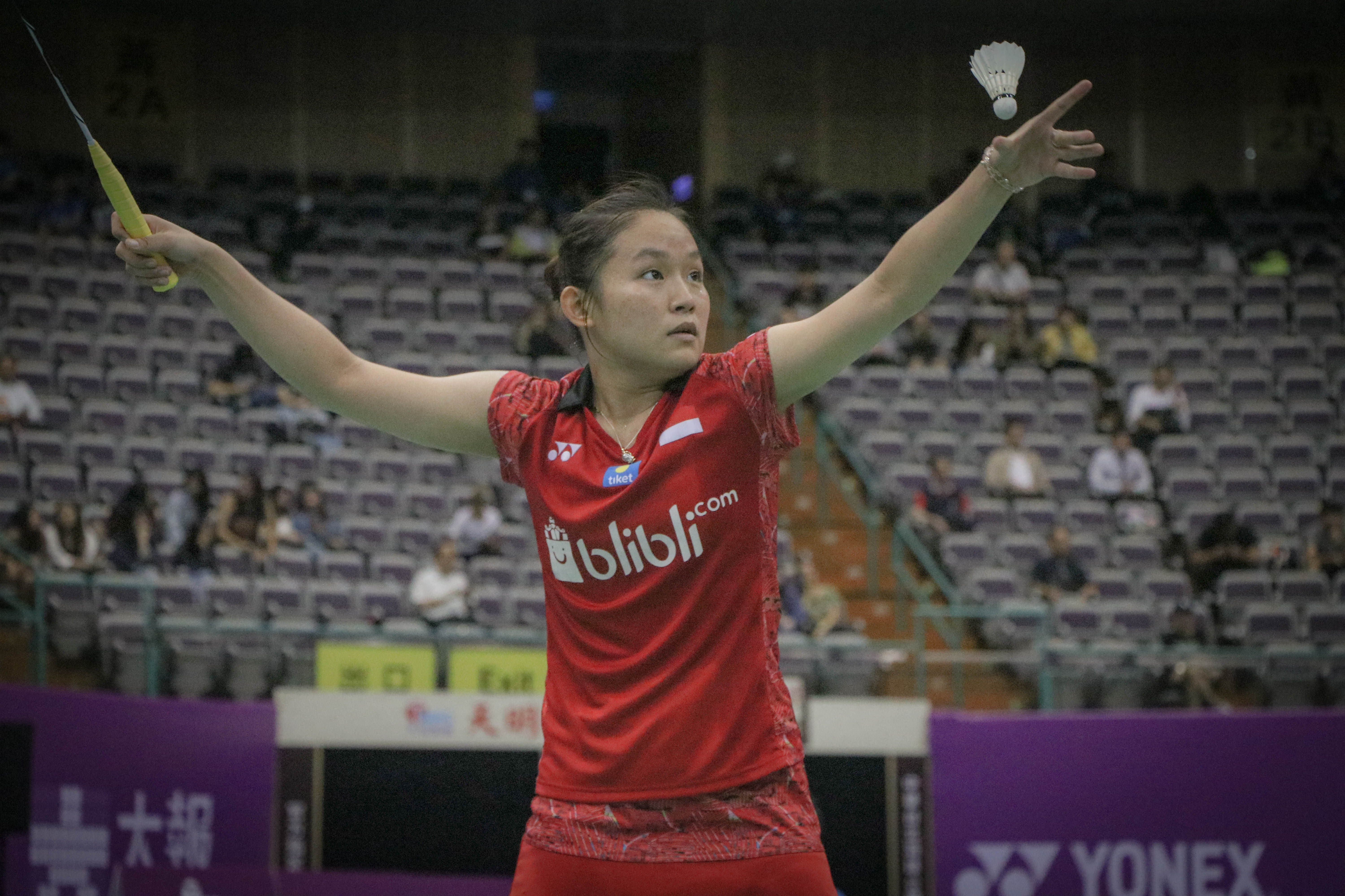 2018 台北OPEN 10/03